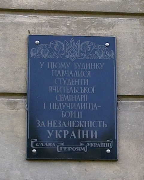 Пам'ятна дошка на будинку Сокальського педагогічного училища (вул. Тартаківська, 10)